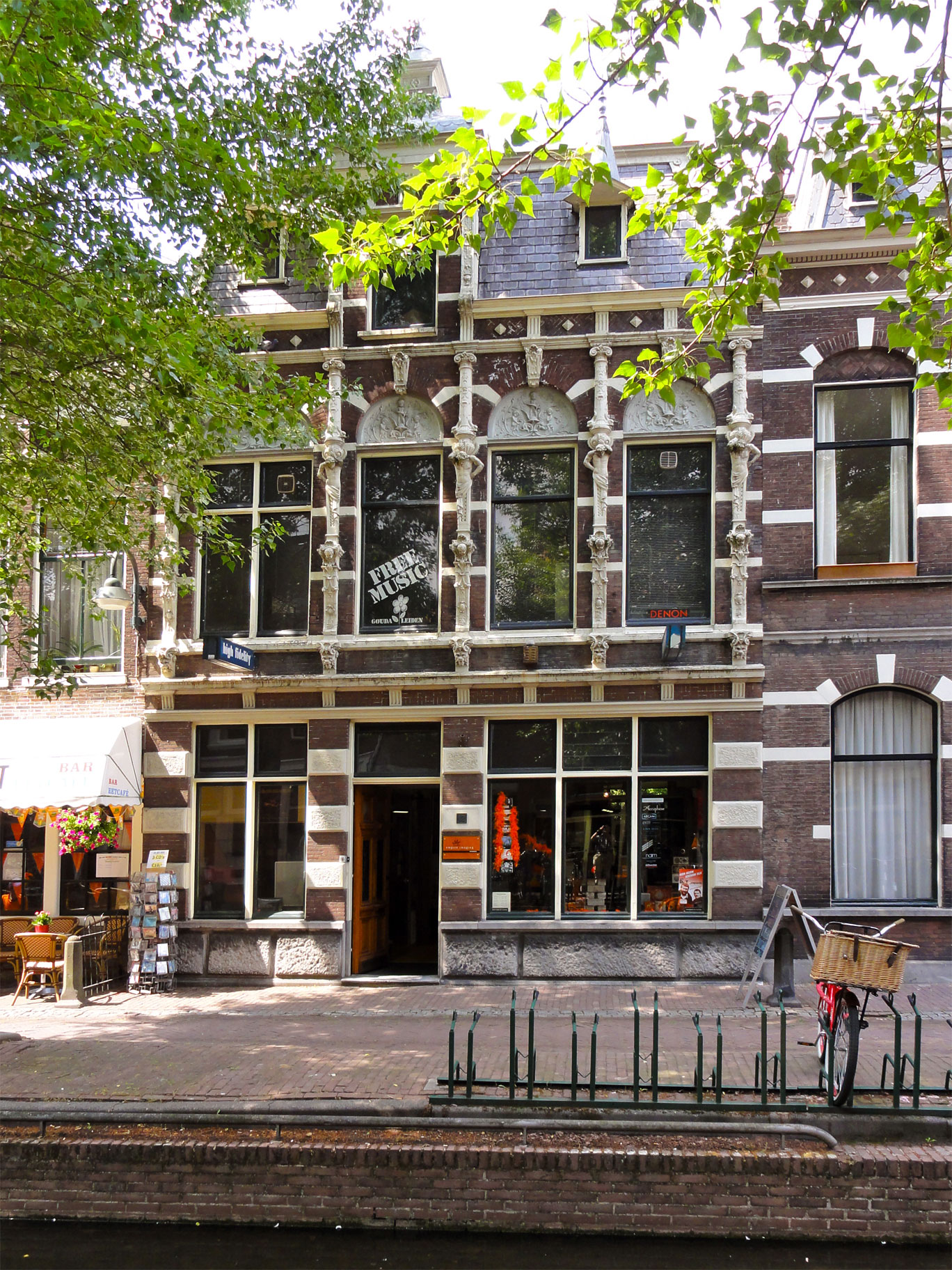 Turfmarkt 12 Gouda, rijksmonument